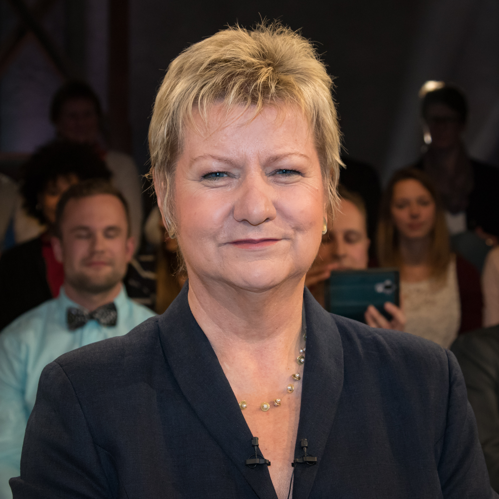 WDR-Sendung Wahl-Arena, Donnerstag, 4. Mai 2017 zur NRW-Wahl: Sylvia Löhrmann